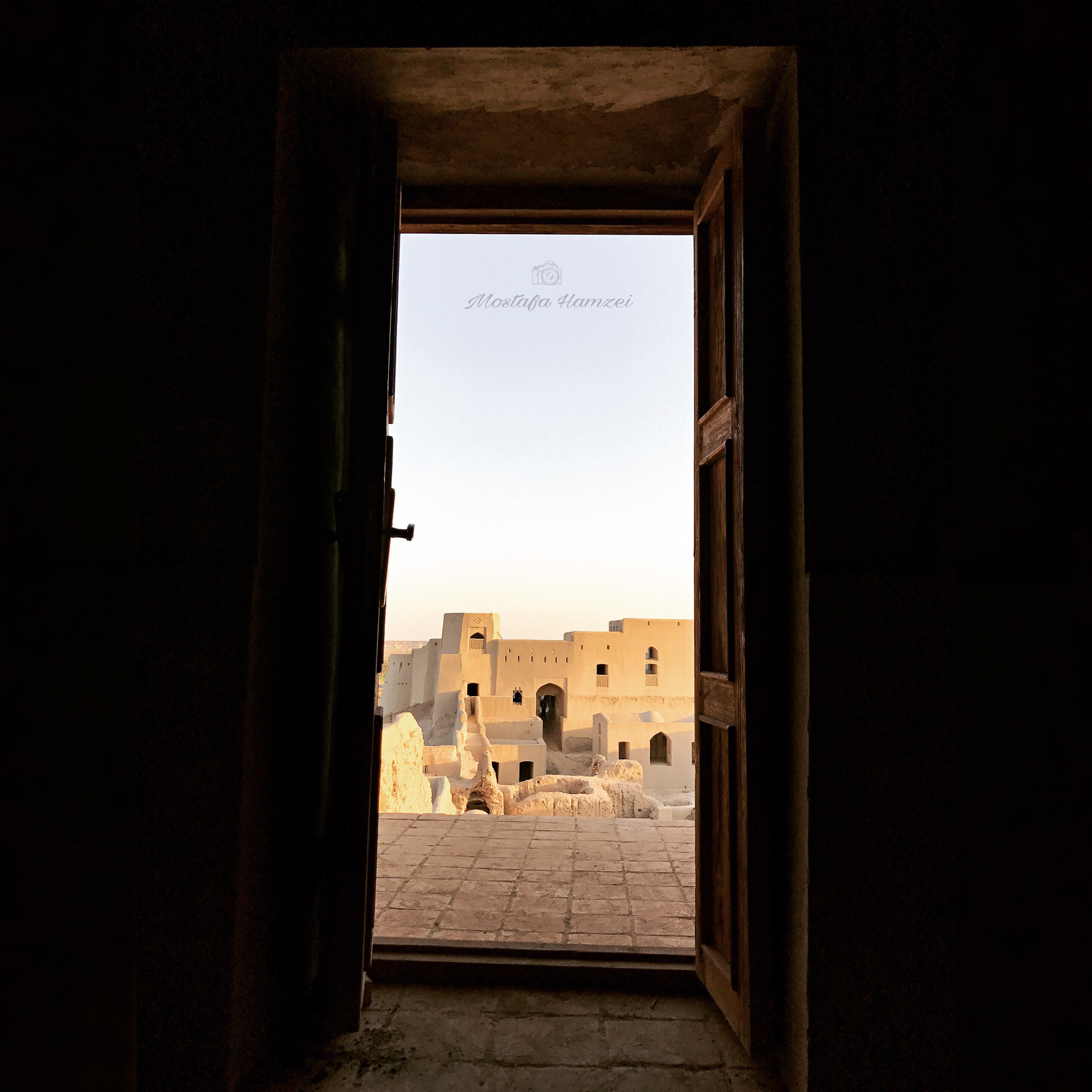 ارگ شمالی